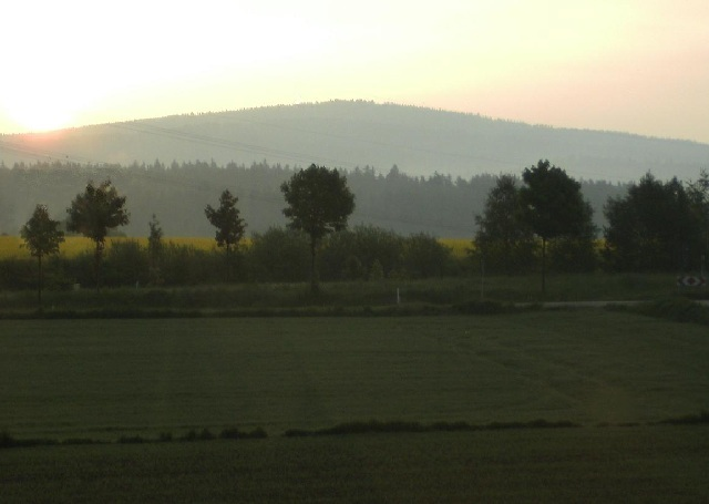 Blick auf den Výhledy